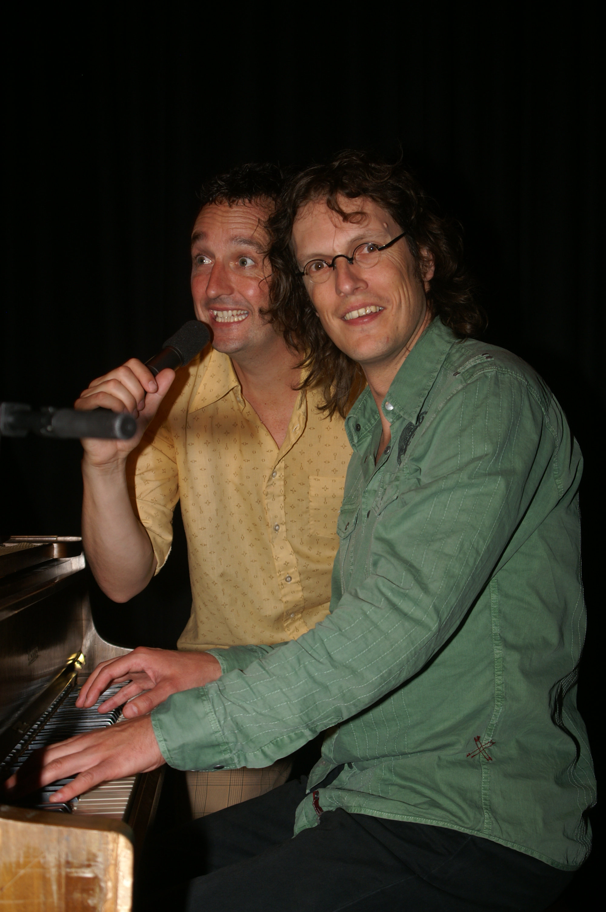 Izak Boom (aan de piano) hier met cabaretier Marcel Harmsen.